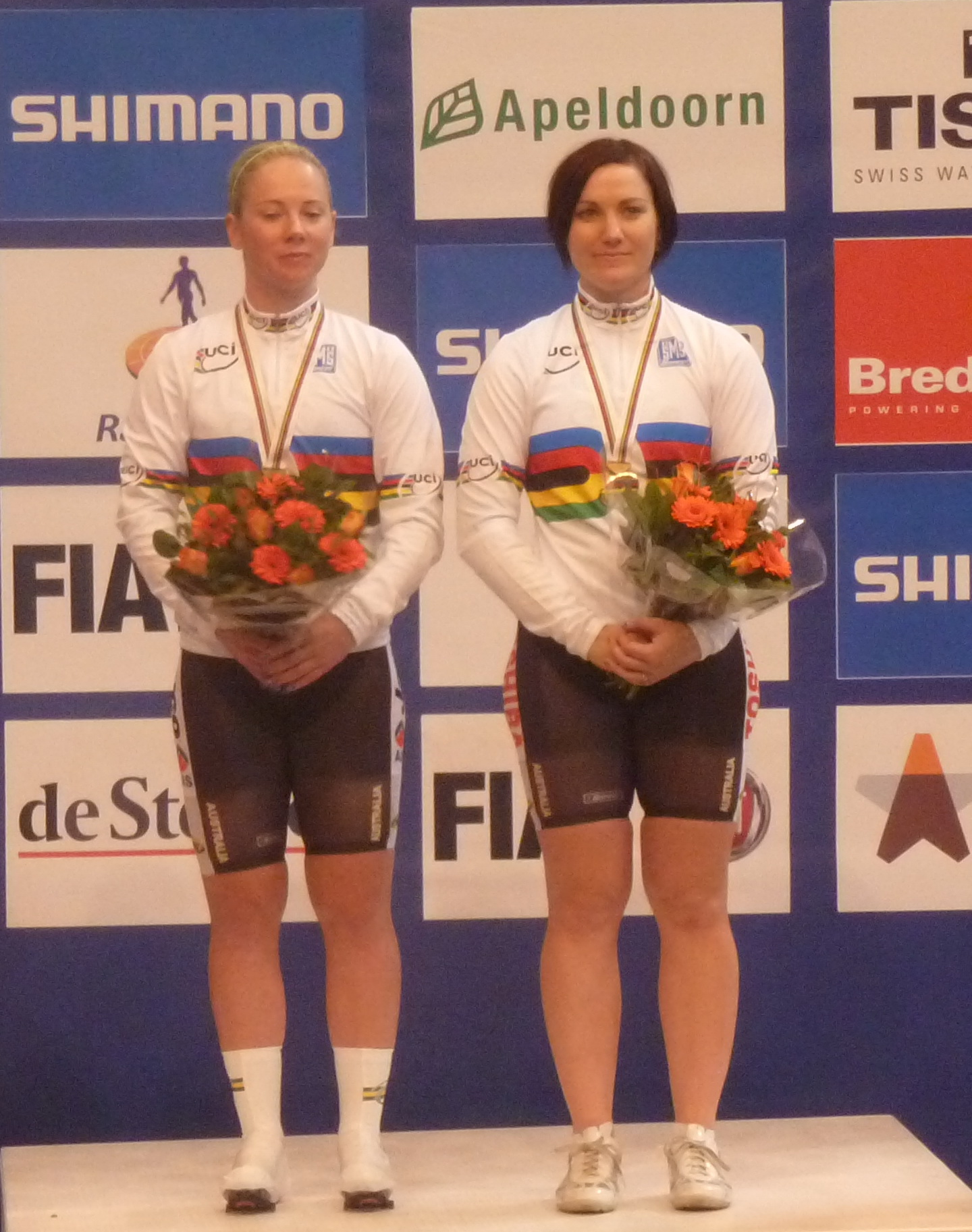 Anna Meares (r.), Kaarle McCulloch, Weltmeisterinnen im Teamsprint, Bahn-WM 2011 Apeldoorn